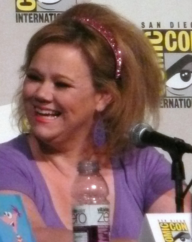 Painel de Phineas & Ferb na San Diego Comic-Con - Caroline Rhea